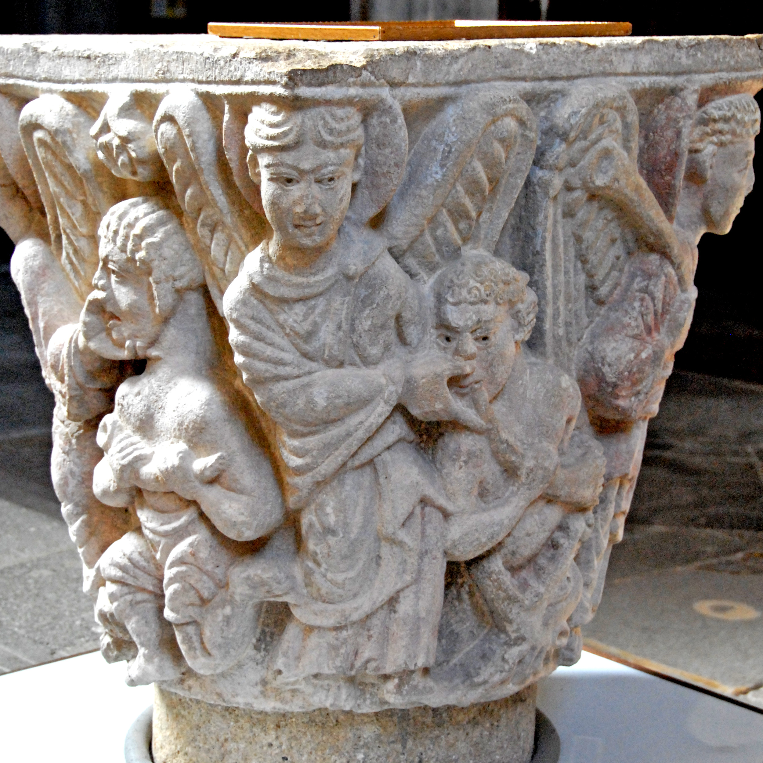 Mozac, Kapitell 48, Offenbarungskapitell